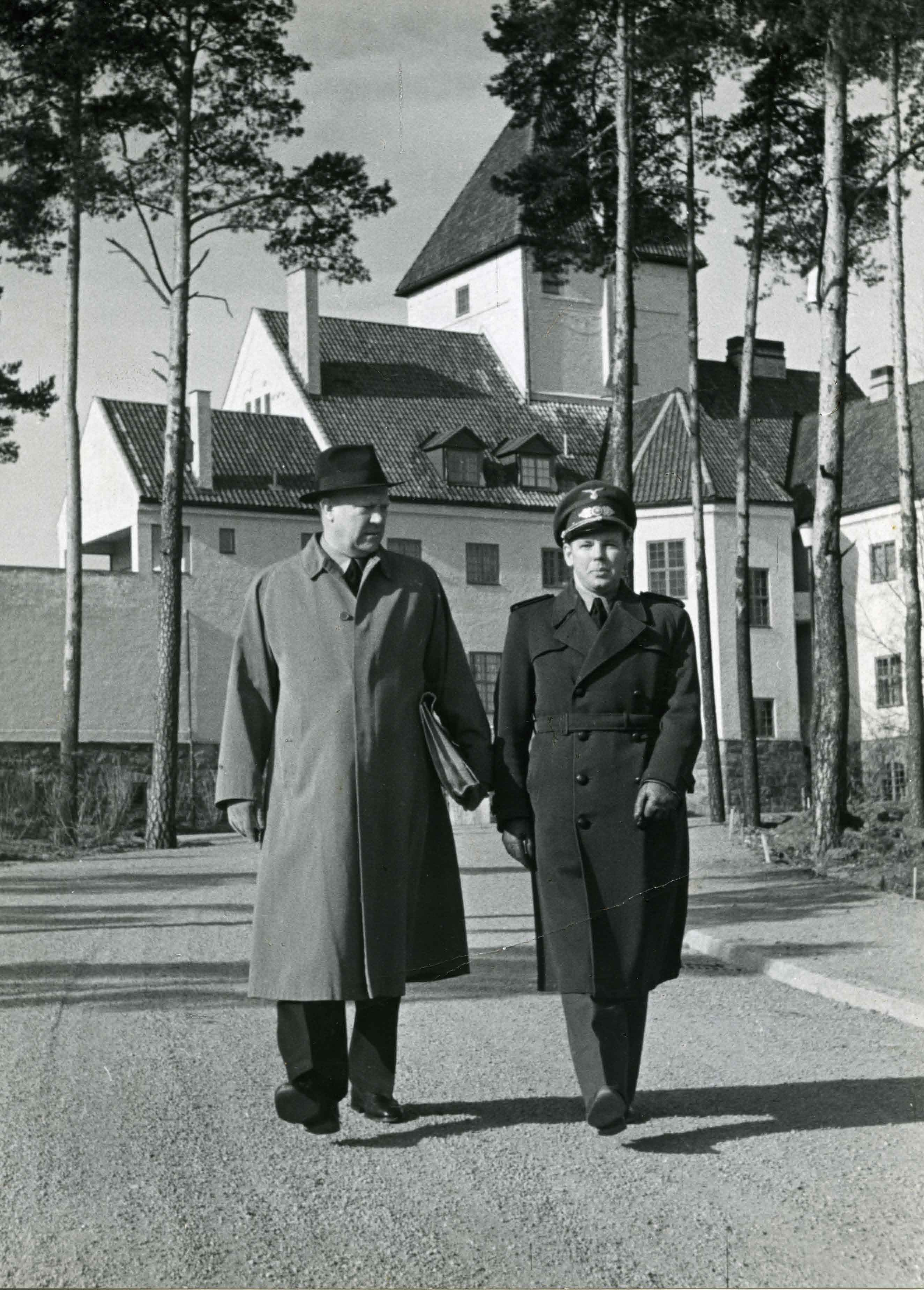 Ukjent datering. NB! Vidkun Quisling og Ørnulf Lundesgaard, ikke Rolf Jørgen Fuglesang RA/PA-0750/H/0002/ 1006